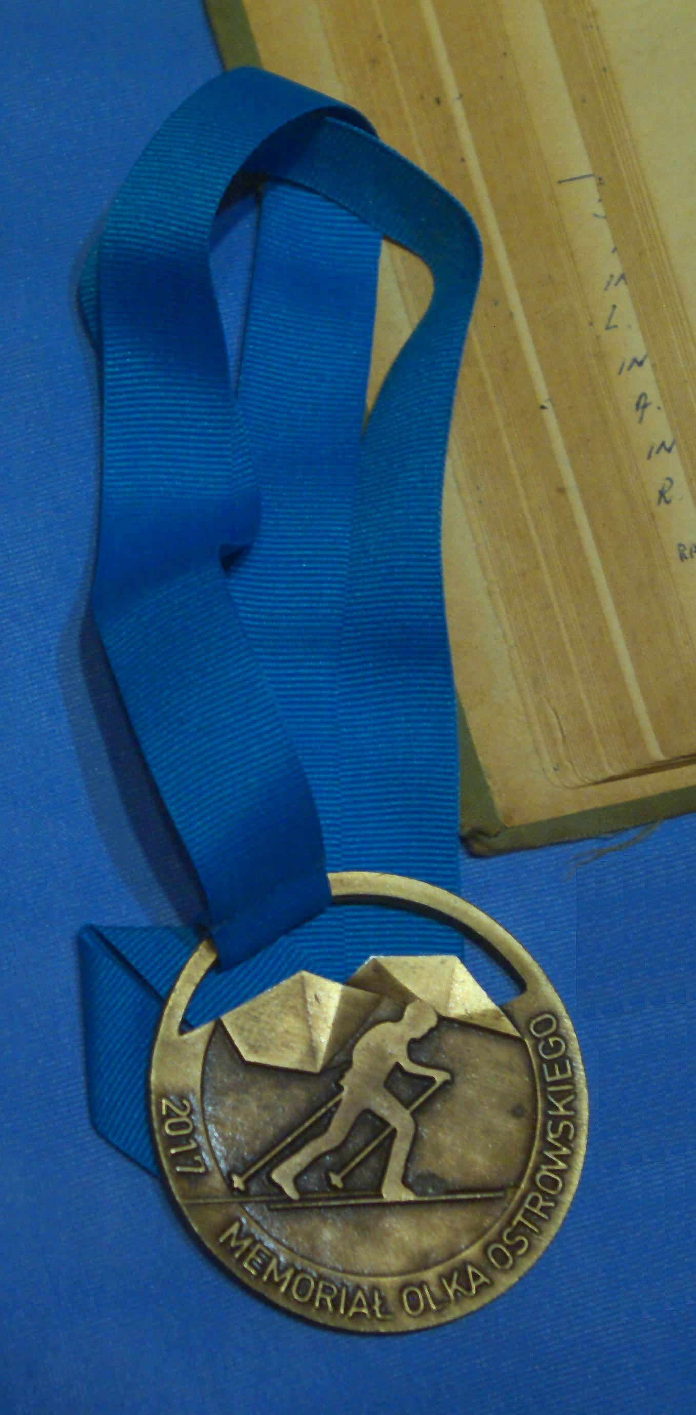 Medal Memoriału Olka Ostrowskiego 2017, udostępniony na ekspozycji Grupy Bieszczadzkiej GOPR w Muzeum Budownictwa Ludowego w Sanoku.